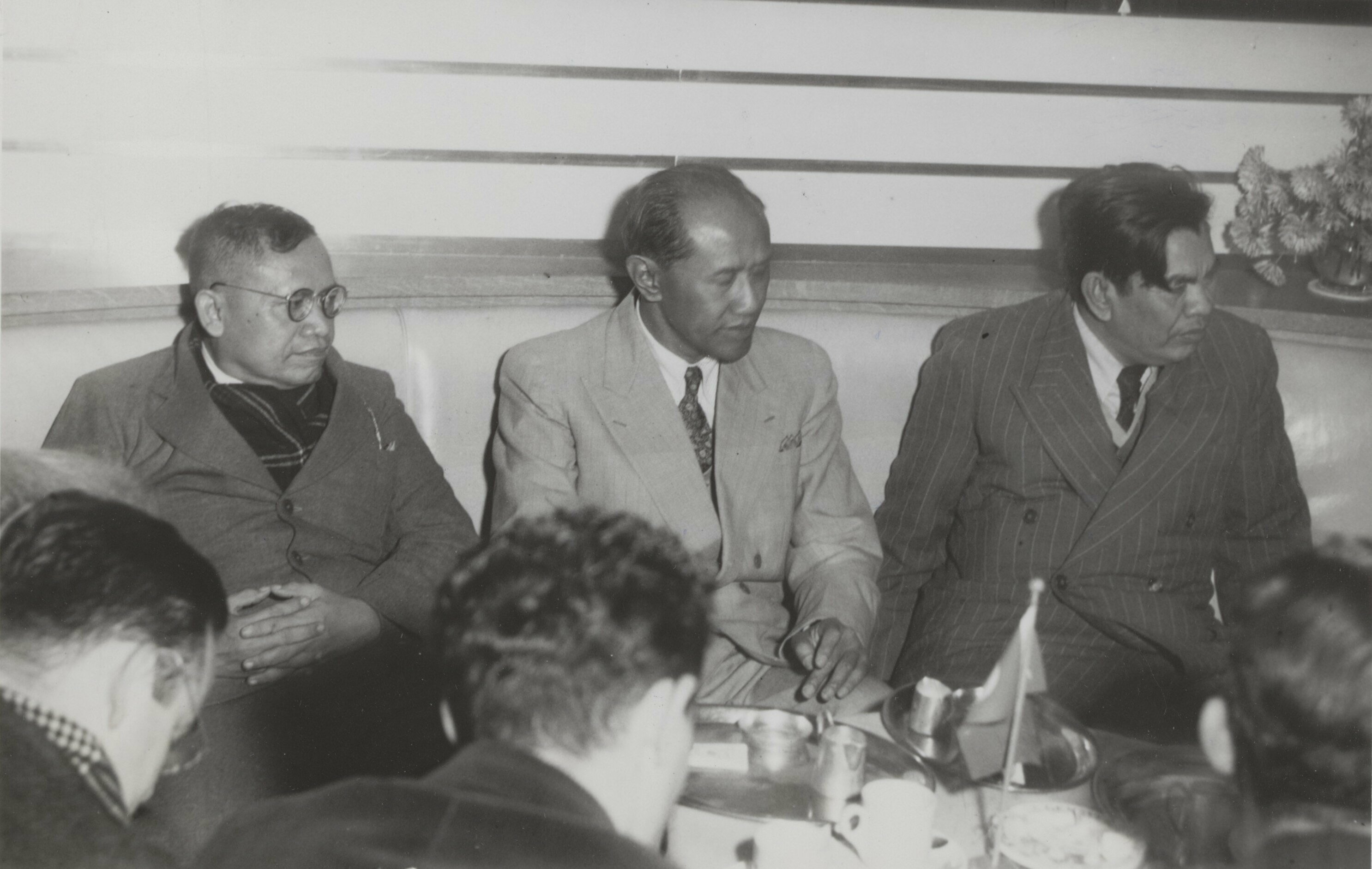 Collectie / Archief : Fotocollectie Elsevier Reportage / Serie : [ onbekend ] Beschrijving : Aankomst op Schiphol van de Nieuw-Guinea delegatie van de Verenigde Staten van Indonesië. Na aankomst op Schiphol waren enkele van de delegatie bereid om de journalisten te woord te staan. Vlnr. Kasimo, voorzitter van de Katholieke Indische Partij; Soekiman, voorzitter Masjoemi en Yamin, onafhankelijk parlementslid Datum : 30 oktober 1950 Locatie : Noord-Holland, Schiphol Trefwoorden : aankomsten, delegaties, persconferenties, politici Persoonsnaam : Kasimo, Soekiman Fotograaf : Nijs, Jac. de / Anefo Auteursrechthebbende : Nationaal Archief Materiaalsoort : Foto (zwart/wit) Nummer archiefinventaris : bekijk toegang 2.24.05.02 Bestanddeelnummer : 069-0580